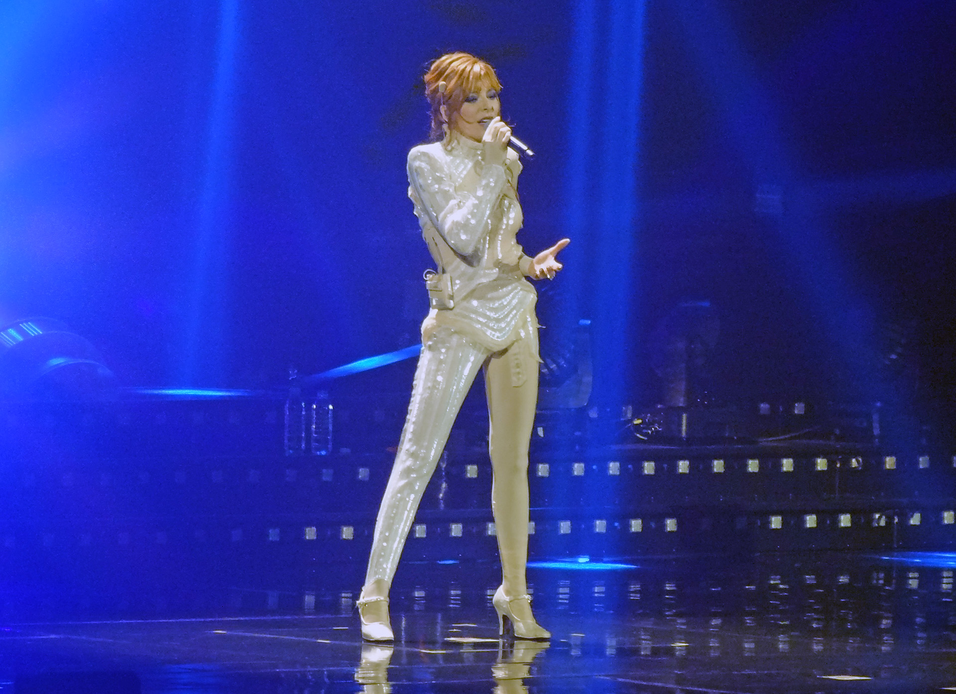 Mylène Farmer lors du concert Timeless 2013, le 10 septembre 2013 à Paris-Bercy, France.